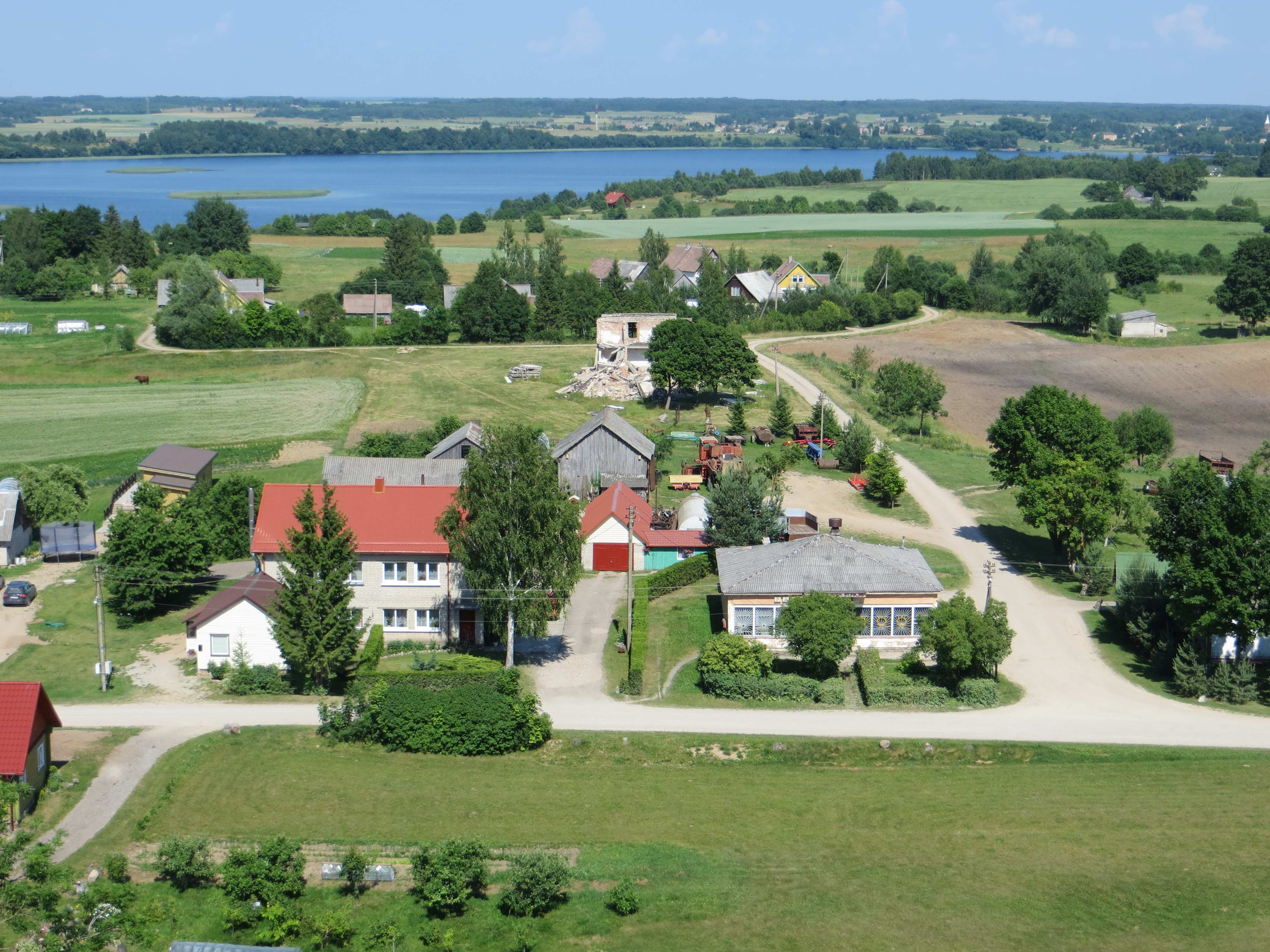 Martnonys, Lithuania